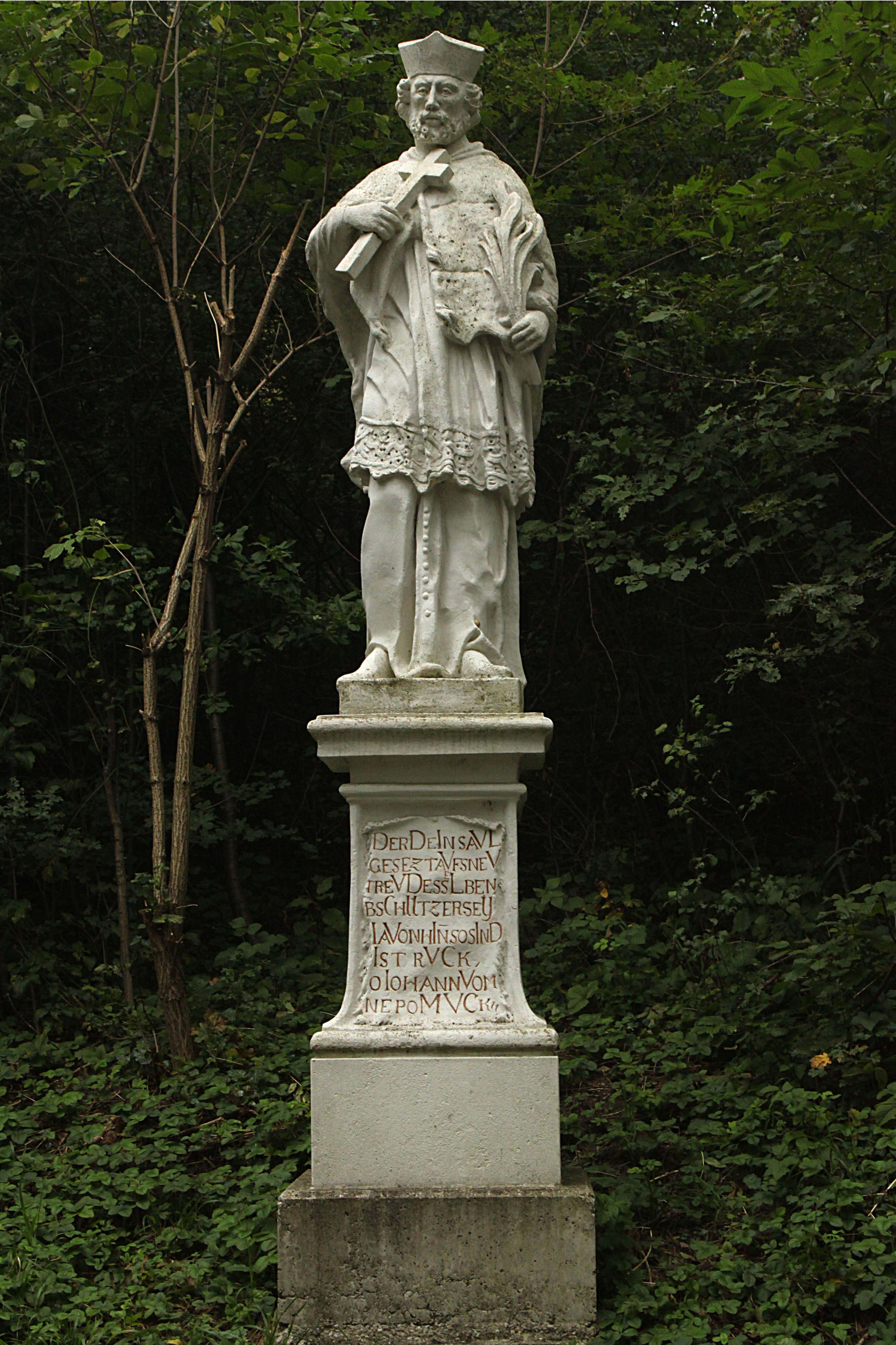 Statue von Johannes von Nepomuk mit Inschrift am Kahlenberg in Wien